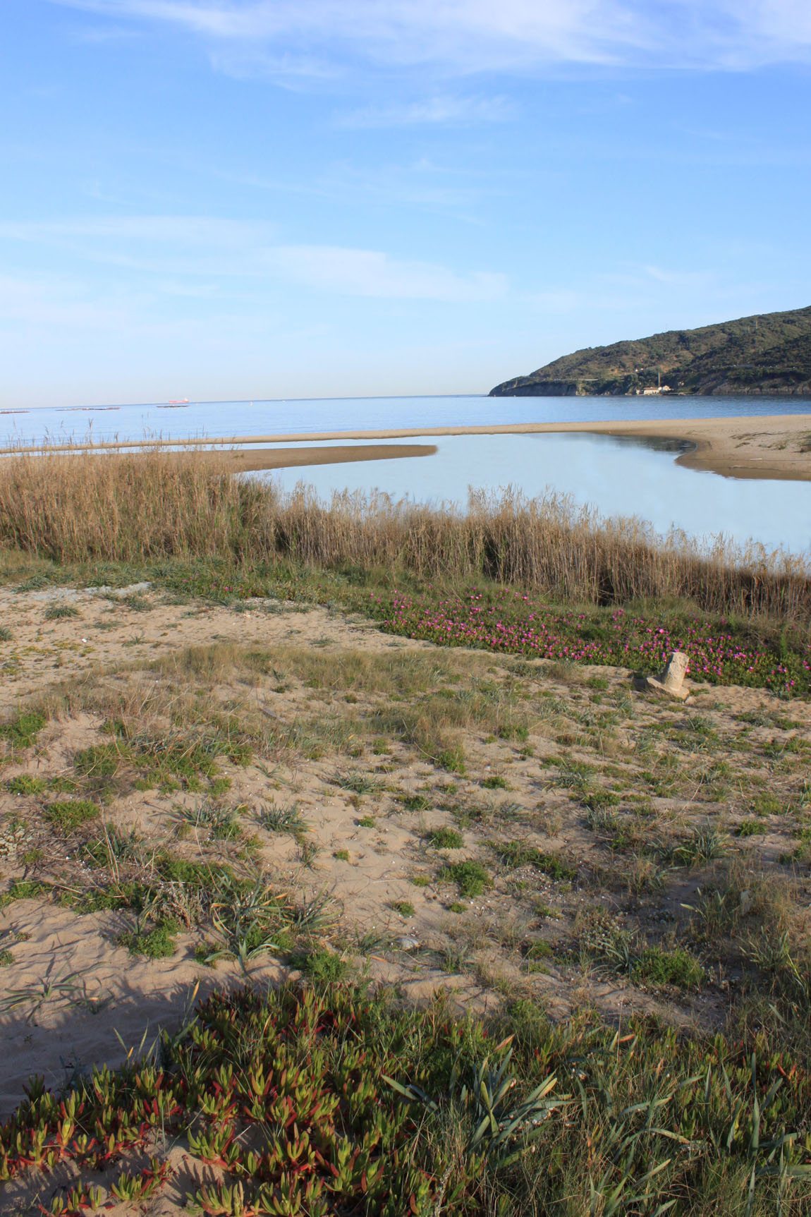 Desembocadura del rio Pícaro en la ensenada de Getares, Algeciras, Andalucía, España